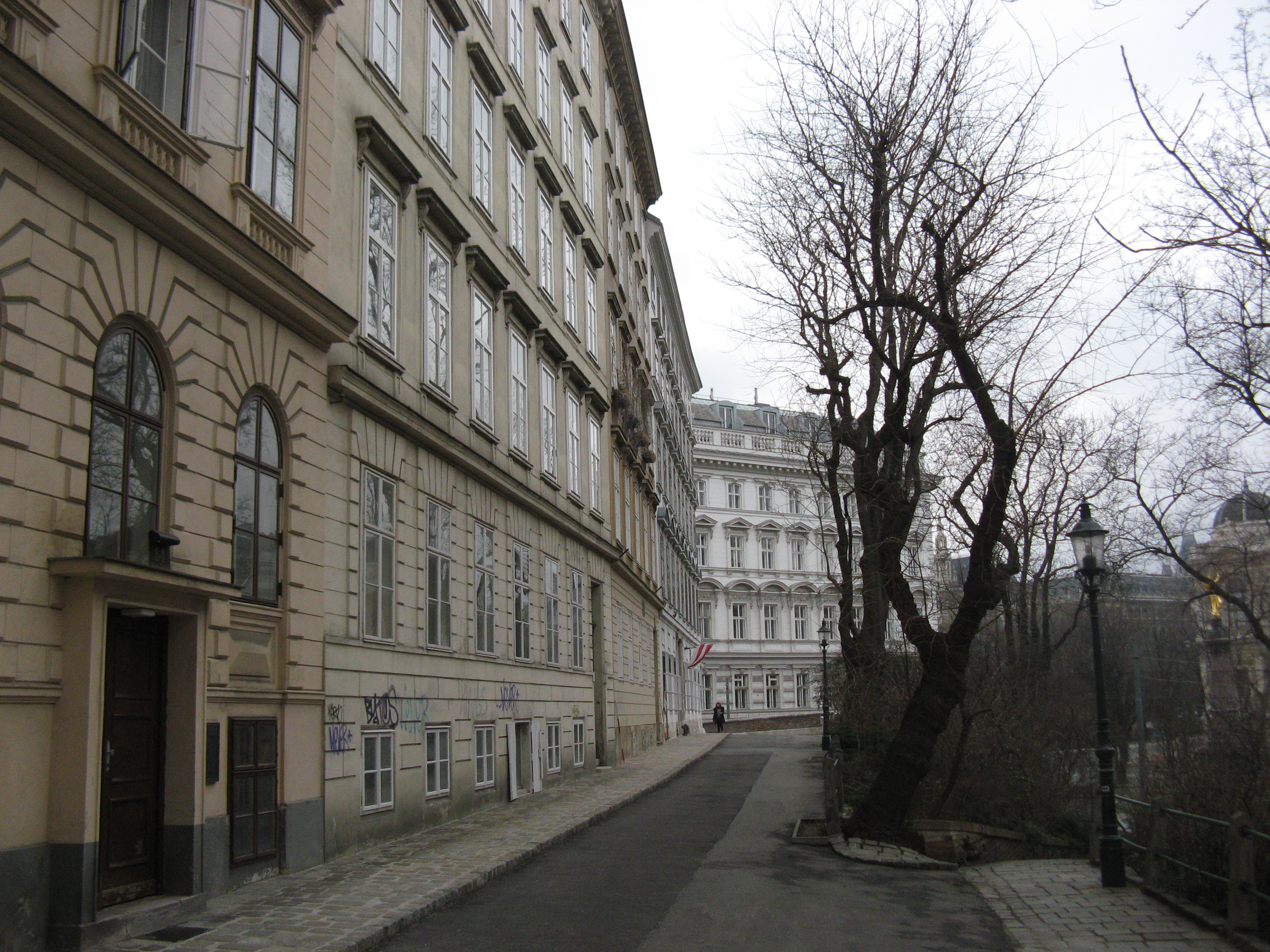 Mölker Bastei 10-14, Wien-Innere Stadt